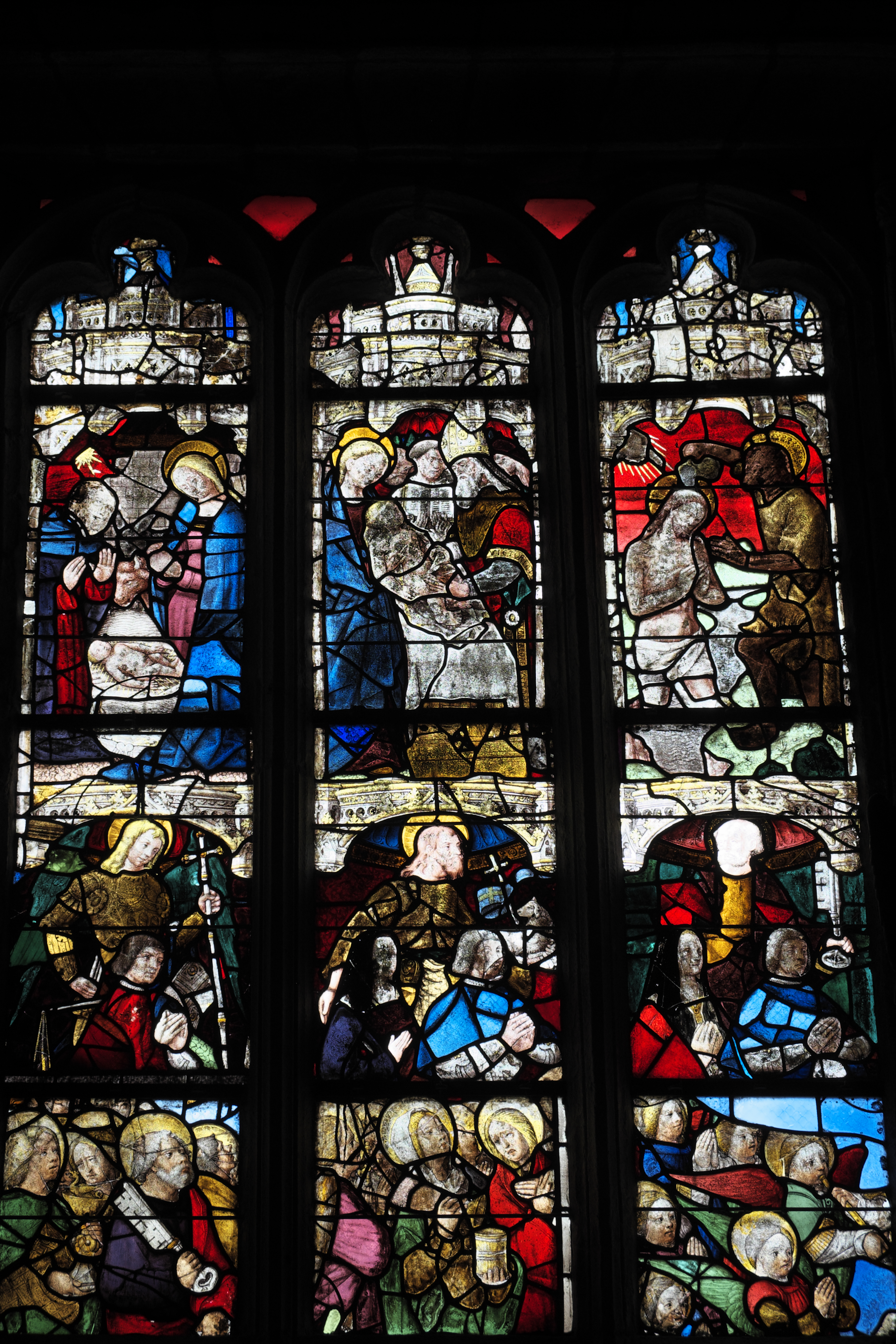 Katholische Kirche Saint-Fiacre in Guengat im Département Finistère (Region Bretagne/Frankreich), Bleiglasfenster (baie 1) um 1500 und um 1525; Darstellung: Szenen aus dem Leben Jesu (oben: Geburt, Beschneidung, Taufe); Mitte: Stifter und Schutzpatrone; unten: Apostel Petrus, Maria Magdalena, Engel